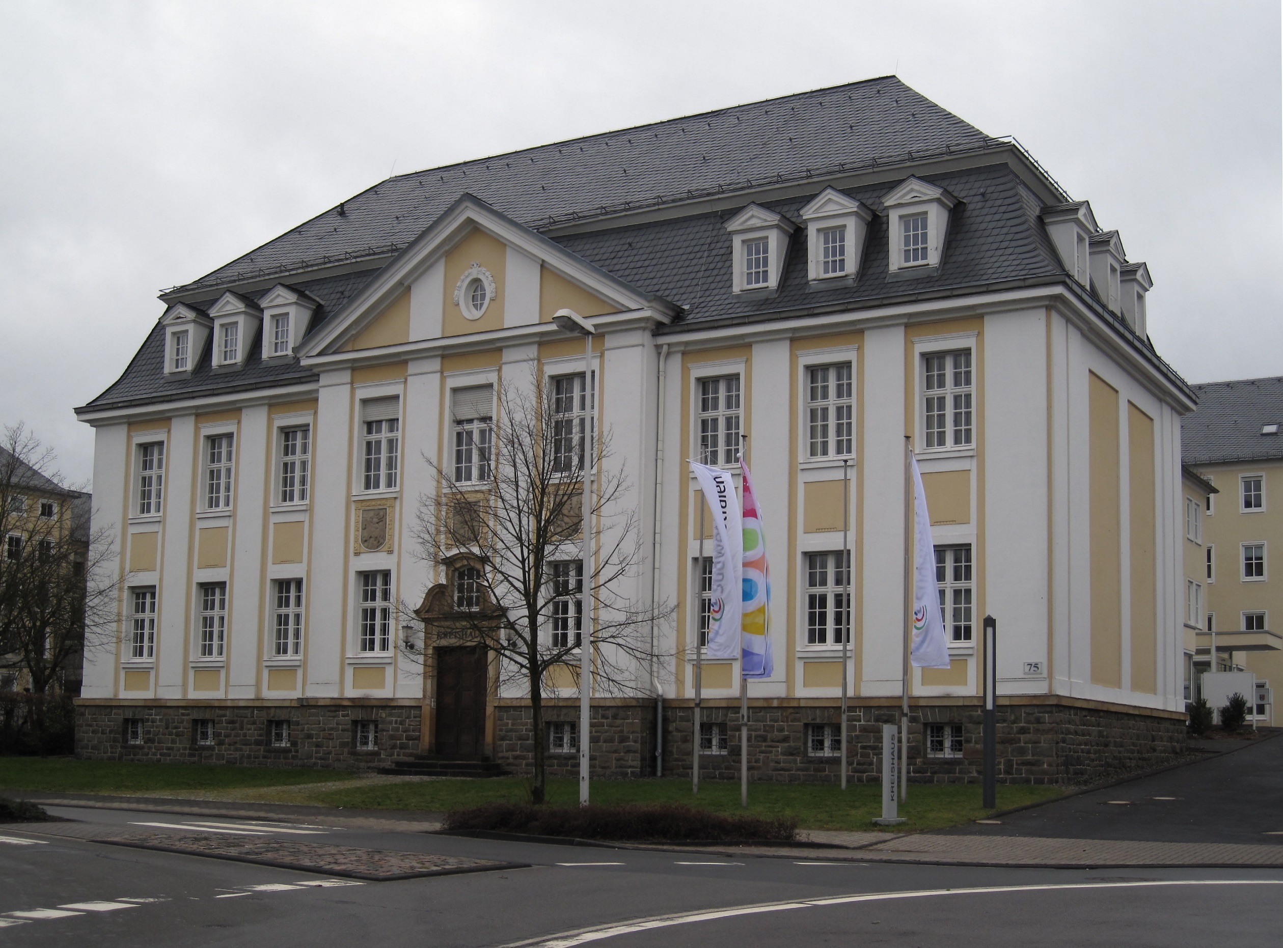 Ehemaliges Gerichtsgebäude des Amtsgerichts Olpe an der Westfälischen Straße 75 in Olpe. Denkmalschutz seit 21. Oktober 1985.